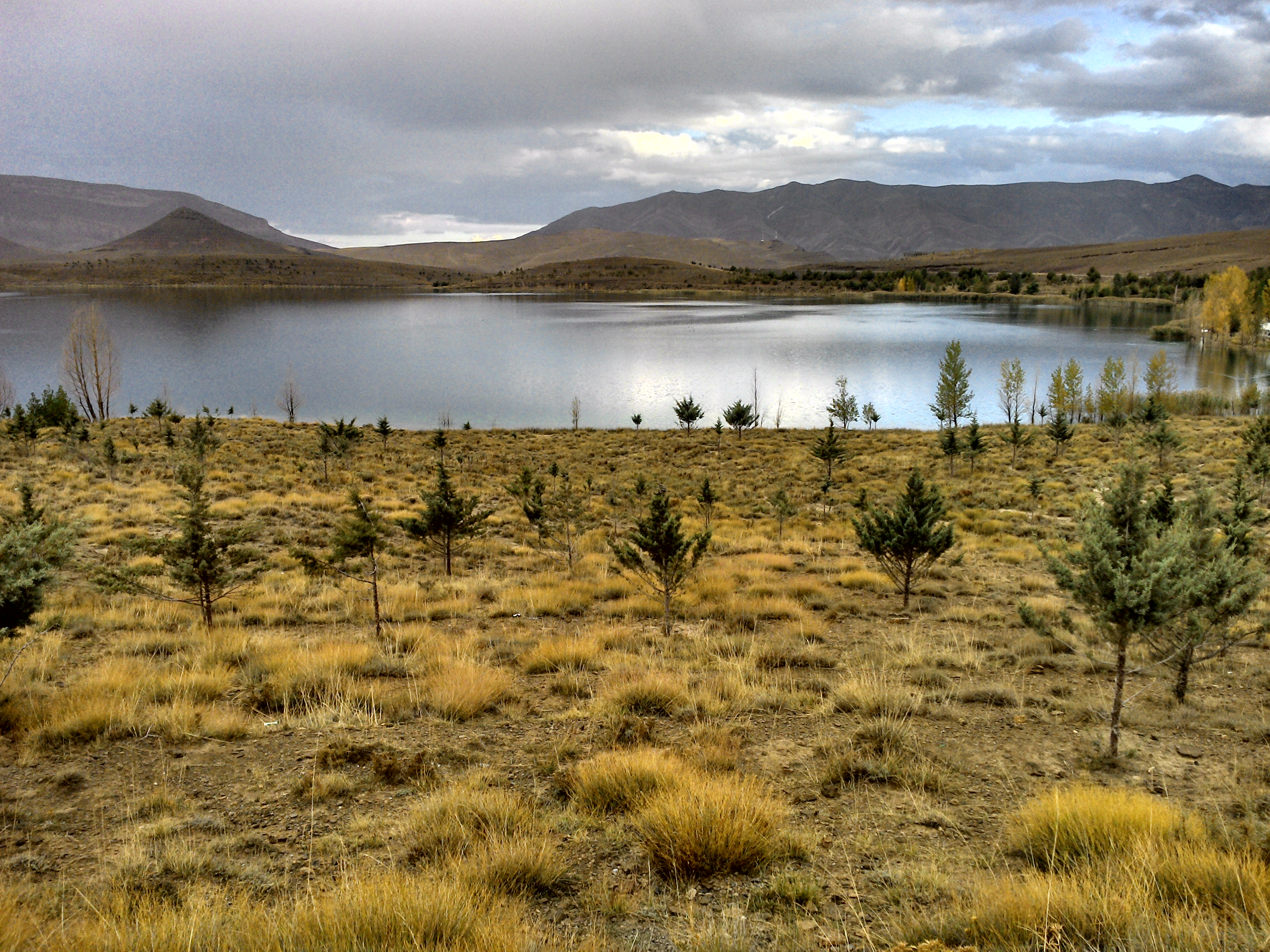 Lac Tislit, Morocco, Imilchil